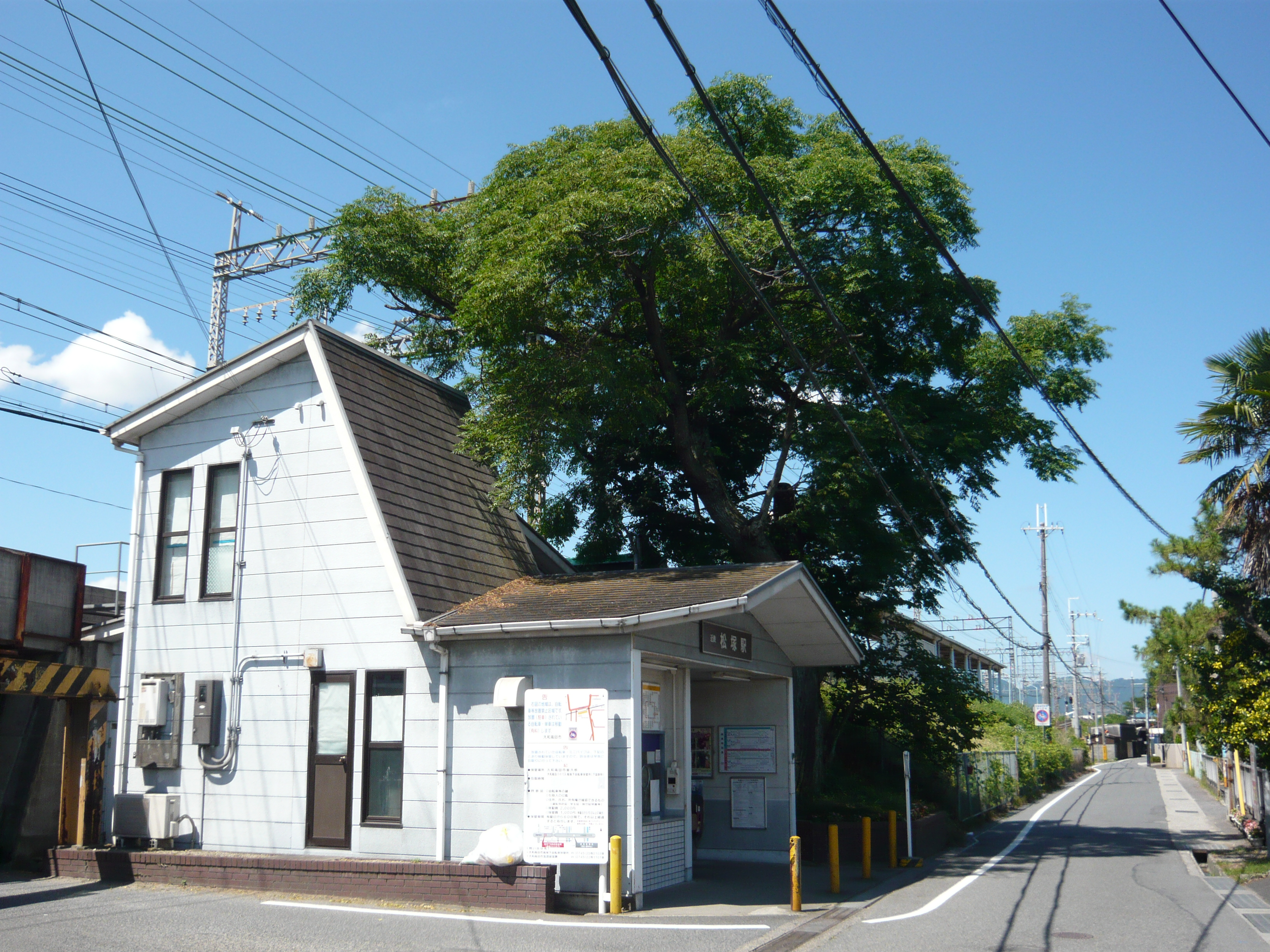 近鉄大阪線 松塚駅 Matsuzuka station, Kintetsu Ōsaka line 2011.7.17